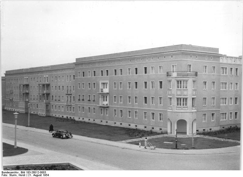 Eisenhüttenstadt, Karl-Marx-Straße, Straße der Jugend Zentralbild Sturm 21.8.1954 Eisenhüttenstadt Gleichzeitig mit dem Eisenhüttenkombinat entsteht in unmittelbarer Nähe des Werkes die erste sozialistische Stadt der Deutschen Demokratischen Republik, Eisenhüttenstadt. Werktätige, die hier in der Nähe ihren Urlaub verbringen, schauen genauso voller Stolz und Bewunderung auf das hier Geleistete, wie die Bevölkerung, die hier eine neue Heimat gefunden hat. In Kürze wird ein Caferestaurant eröffnet werden, ein Teil ist bereits in Betrieb, das sich mit den Restaurants "Warschau" und "Budapest" in Berlin messen kann. UBz: Das Gesicht Eisenhüttenstadt. Karl-Marx-Strasse Ecke Strasse der Jugend